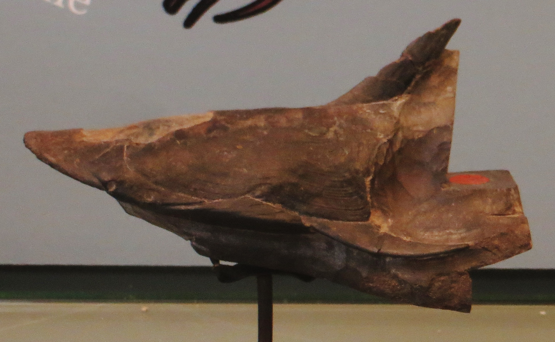 Larnovaspis fossil